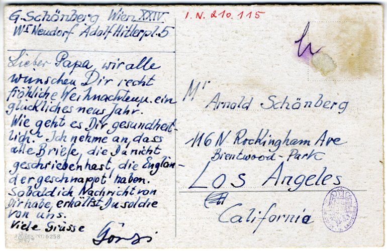 Weihnachtskarte an den Komponisten Arnold Schönberg von seinem Sohn Georg; Wienbibliothek, Handschriftensammlung, Teilnachlass Georg Schönberg, H.I.N. 210115